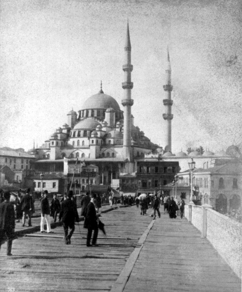 İstanbul Yeni Cami'nin Galata Köprüsünden çekilmiş eski bir fotoğrafı